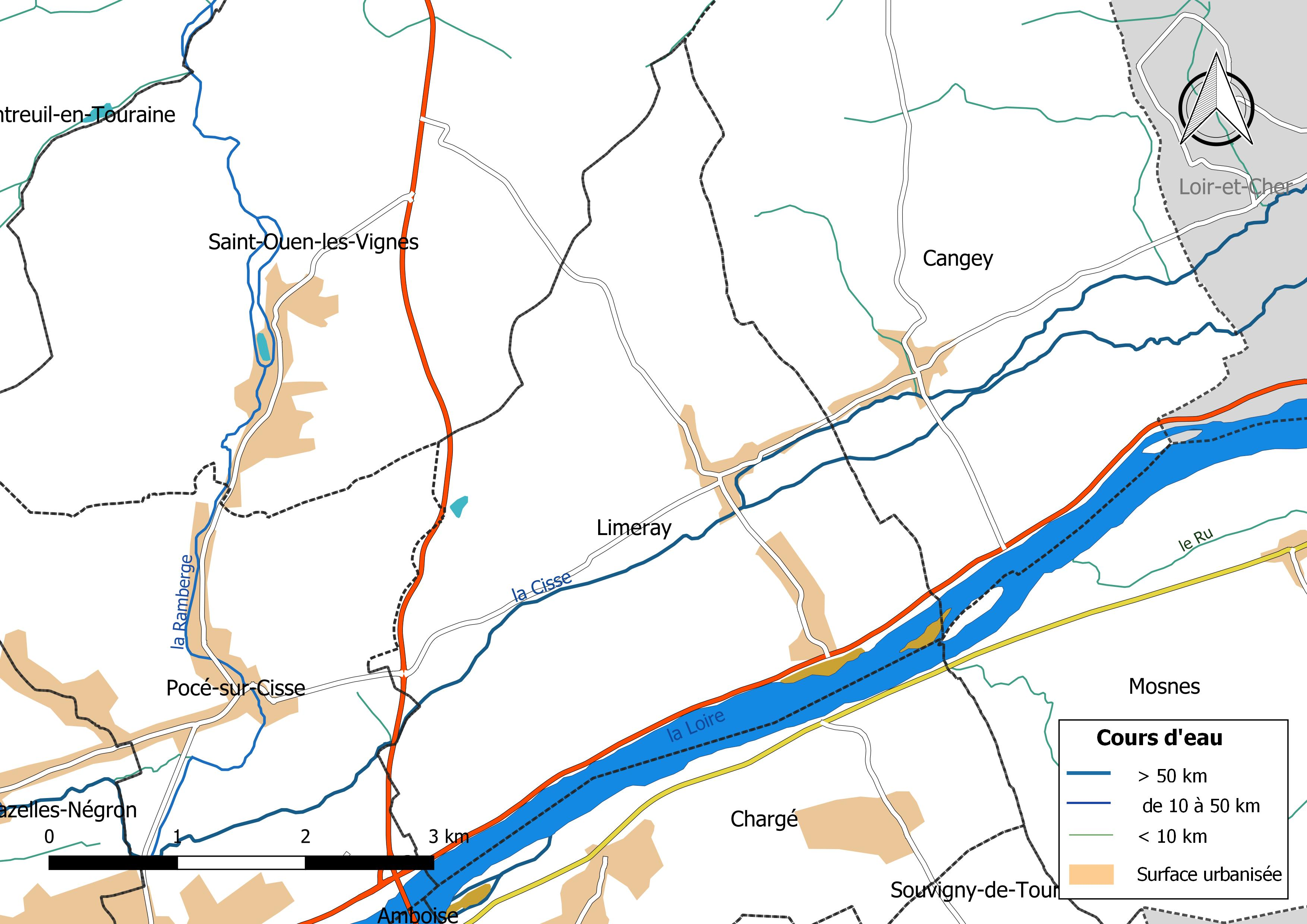 Carte du réseau hydrographique de la commune de Limeray (France).